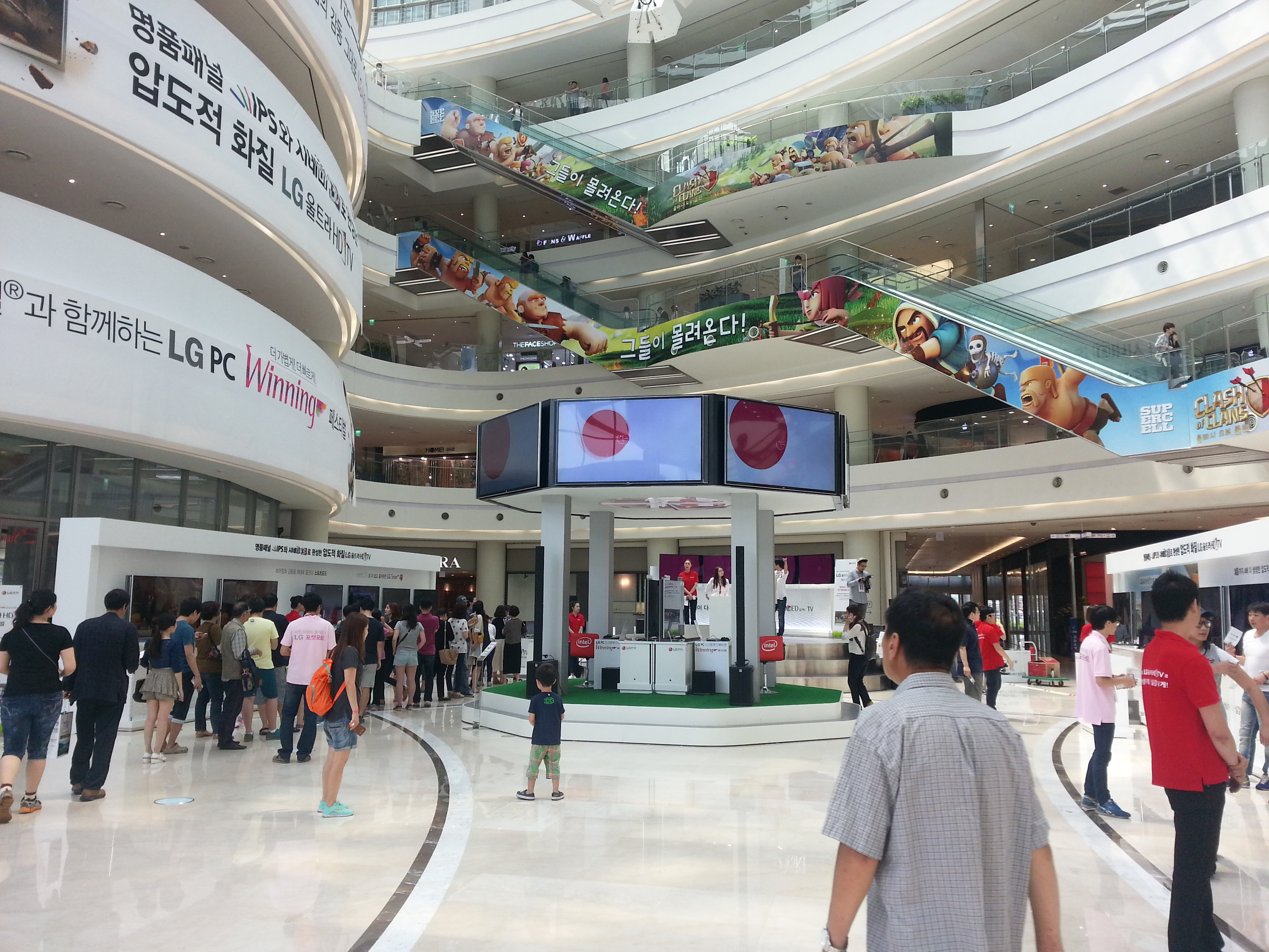 2014년 6월 22일 영등포타임스퀘어 내부